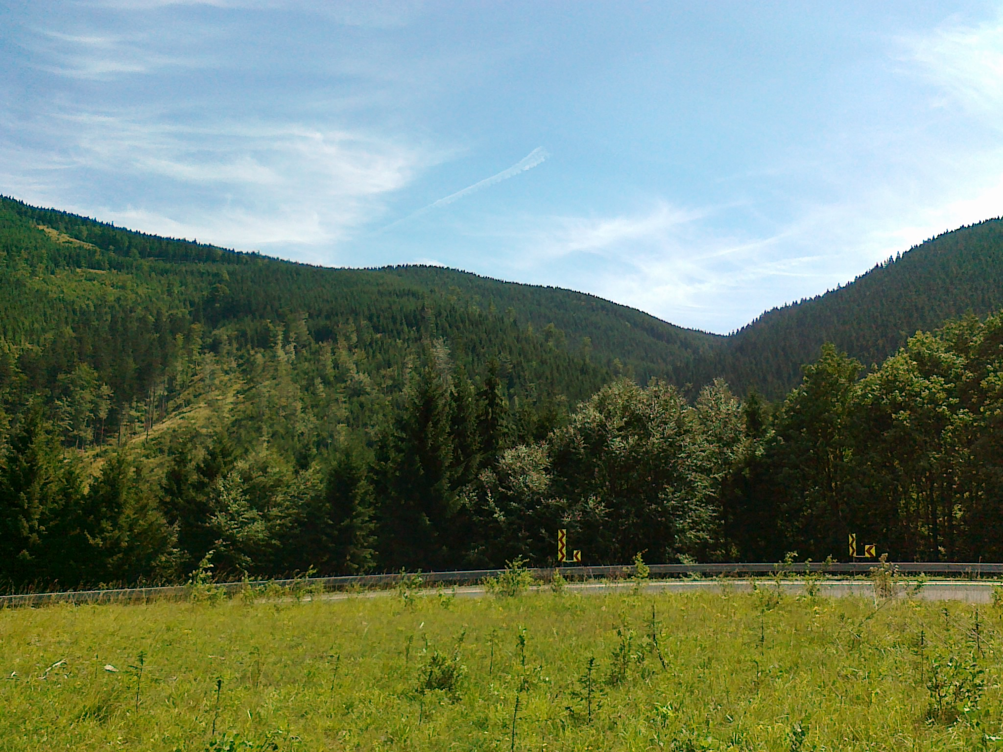 Widok z drogi nr 44 na szczyt Velký Klín-JZ - 1092 m